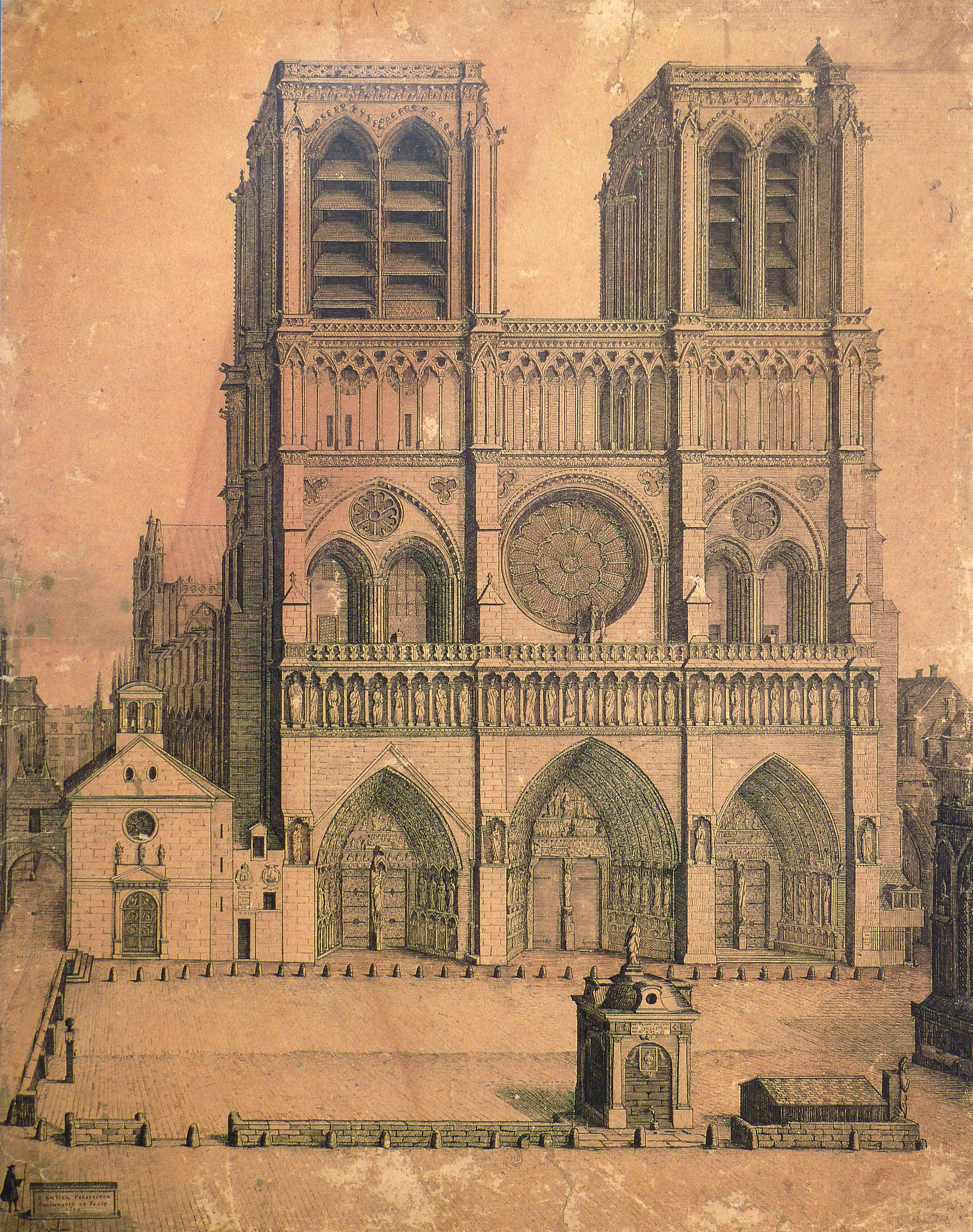 Façade et parvis de N-D de Paris, dessin signé en bas à gauche Antier, 1699. Sur la gauche l'ancien baptistère. La fontaine du parvis et à droite la statue du Jeûneur. Bibliothèque Nationale, Cabinet des Estampes, n° VA 419